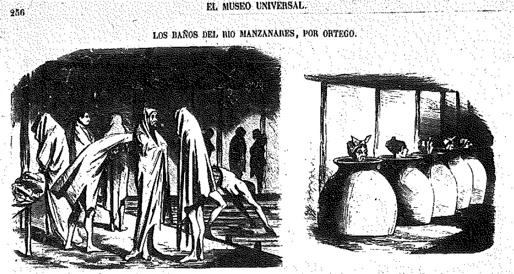 «Baños del Manzanares», en la revista española El Museo Universal.